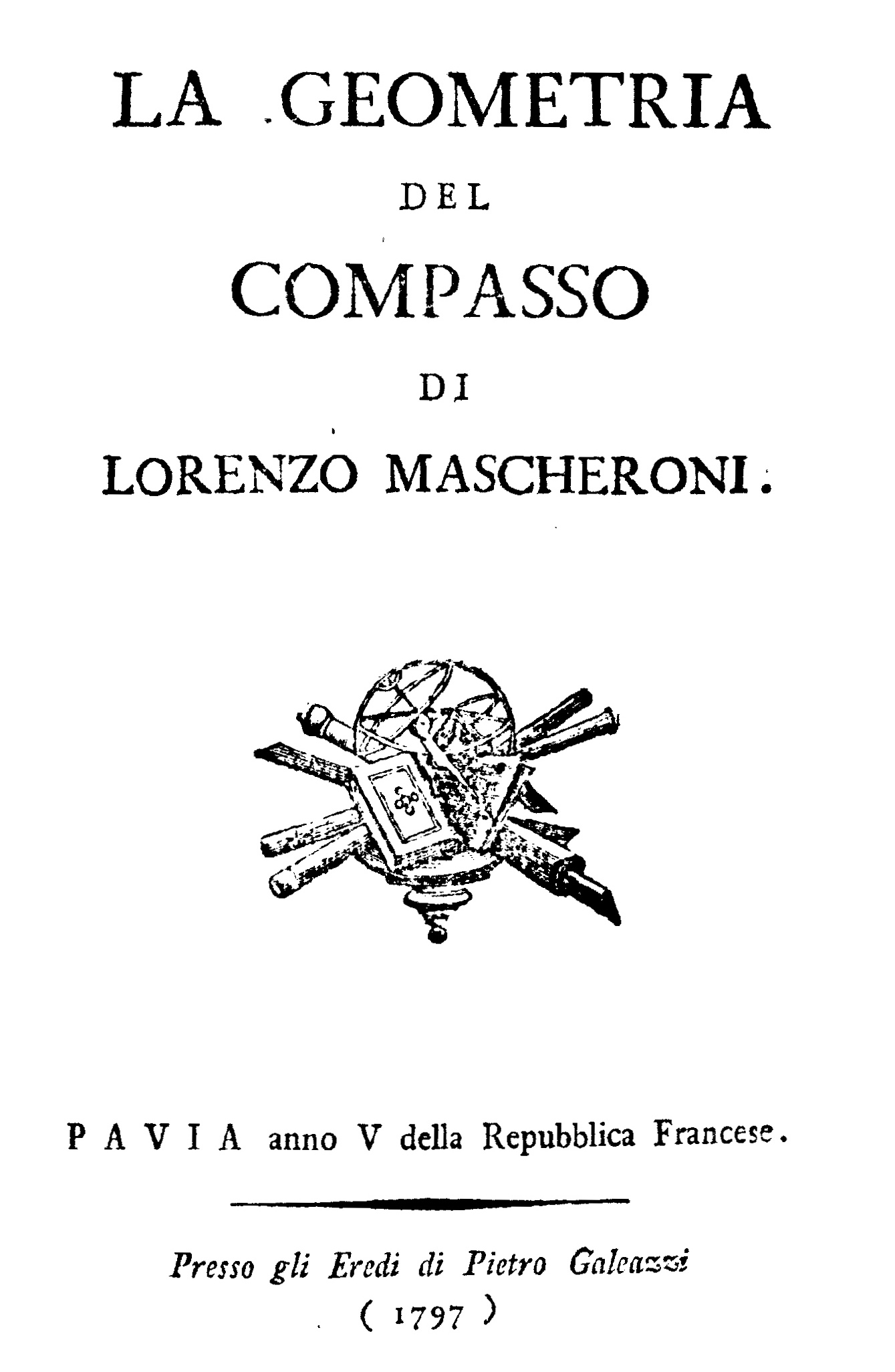 La geometria del compasso di Lorenzo Mascheroni. - Pavia : presso gli eredi di Pietro Galeazzi, anno V della Repubblica francese [1797]. - [2], XVIII, 264 p., [14] c. di tav. ripiegate : ill. ; 8º .